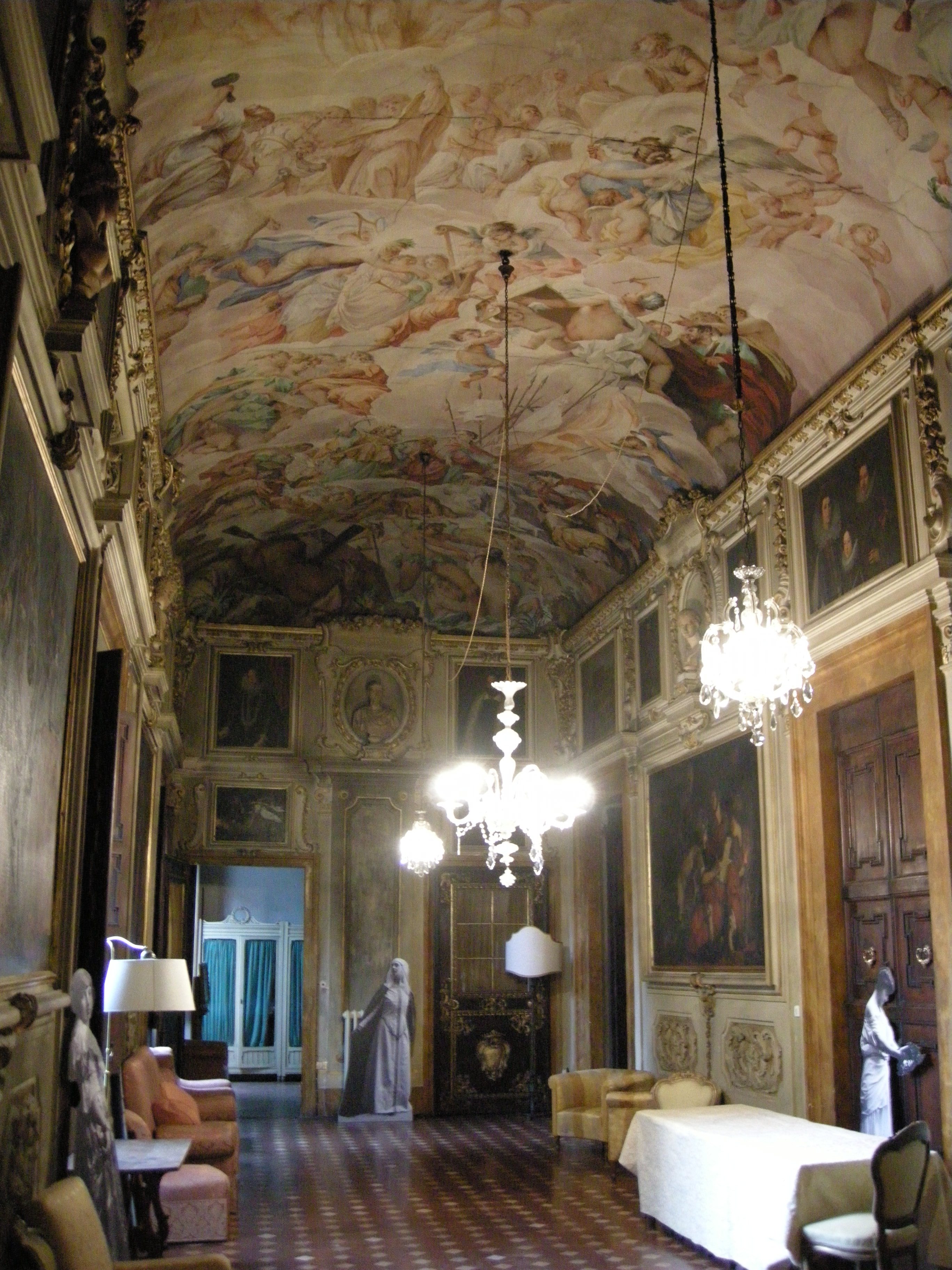 Palazzo giugni, galleria